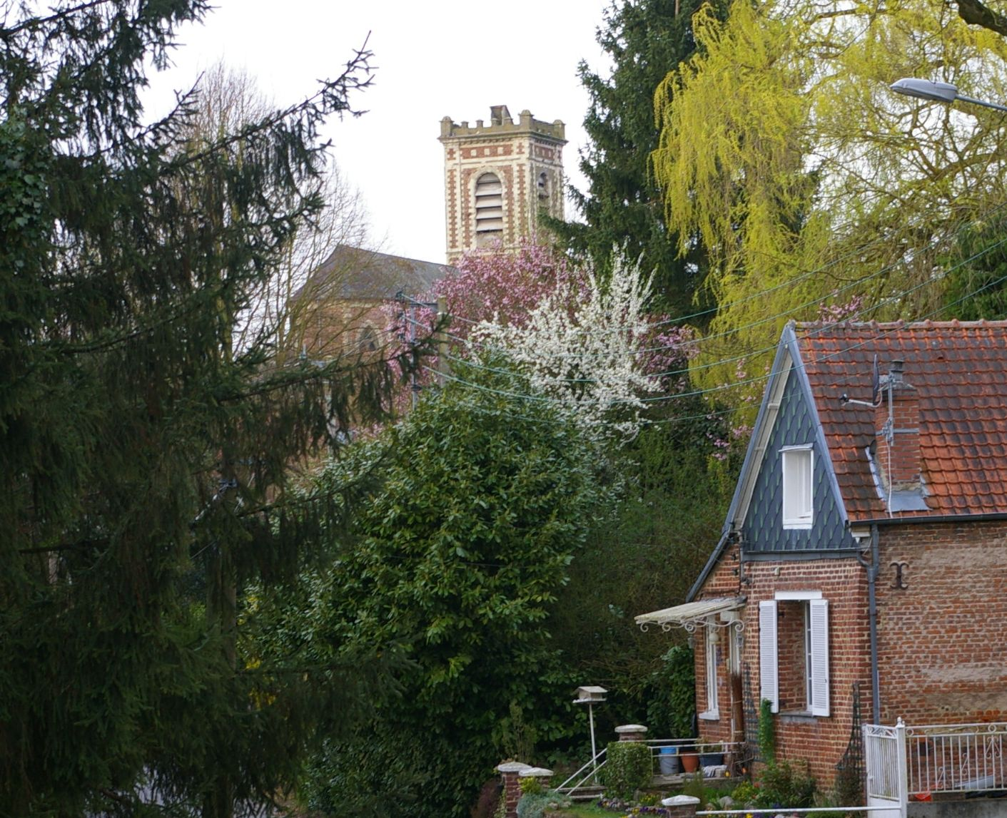 Eglise vue de l'ancienne voie ferrée